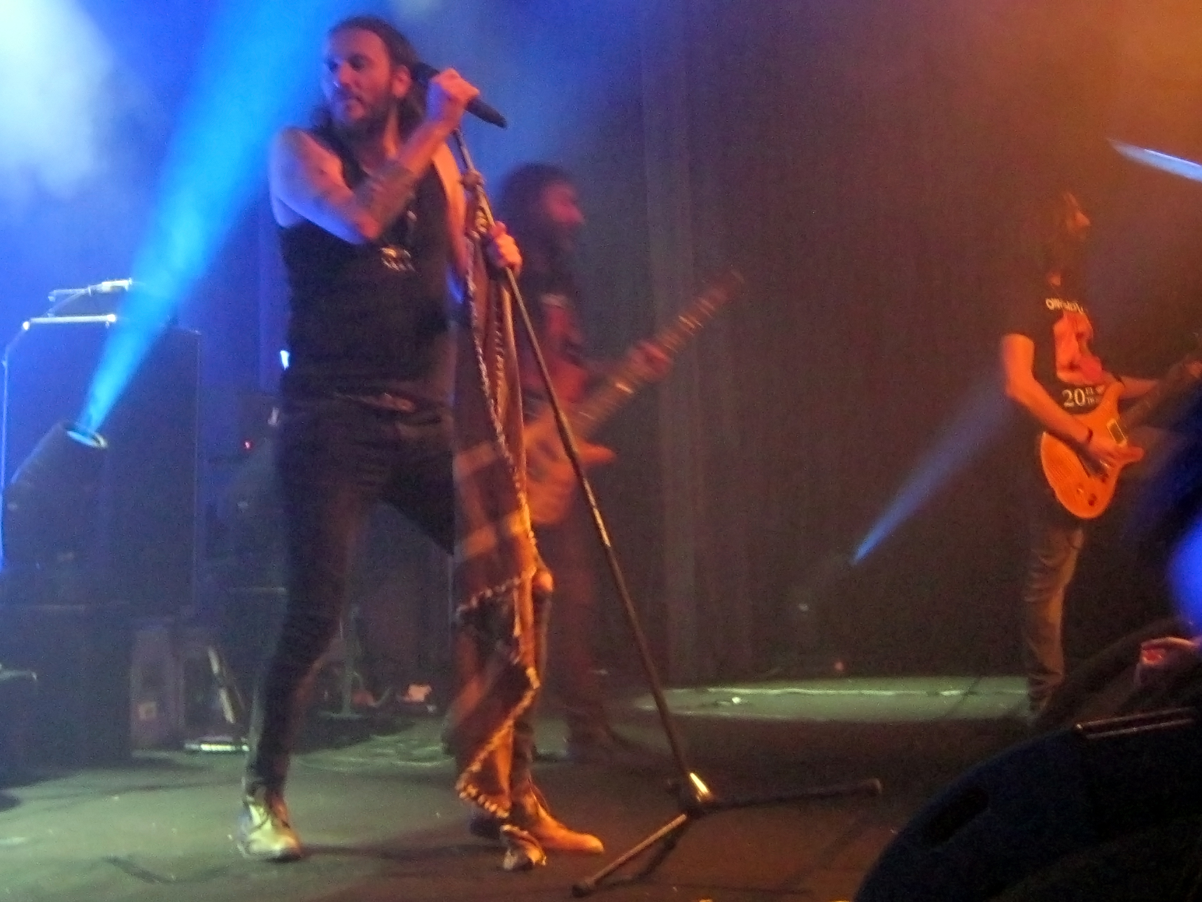 Orphaned Land, Riding 3. 26/05/2016